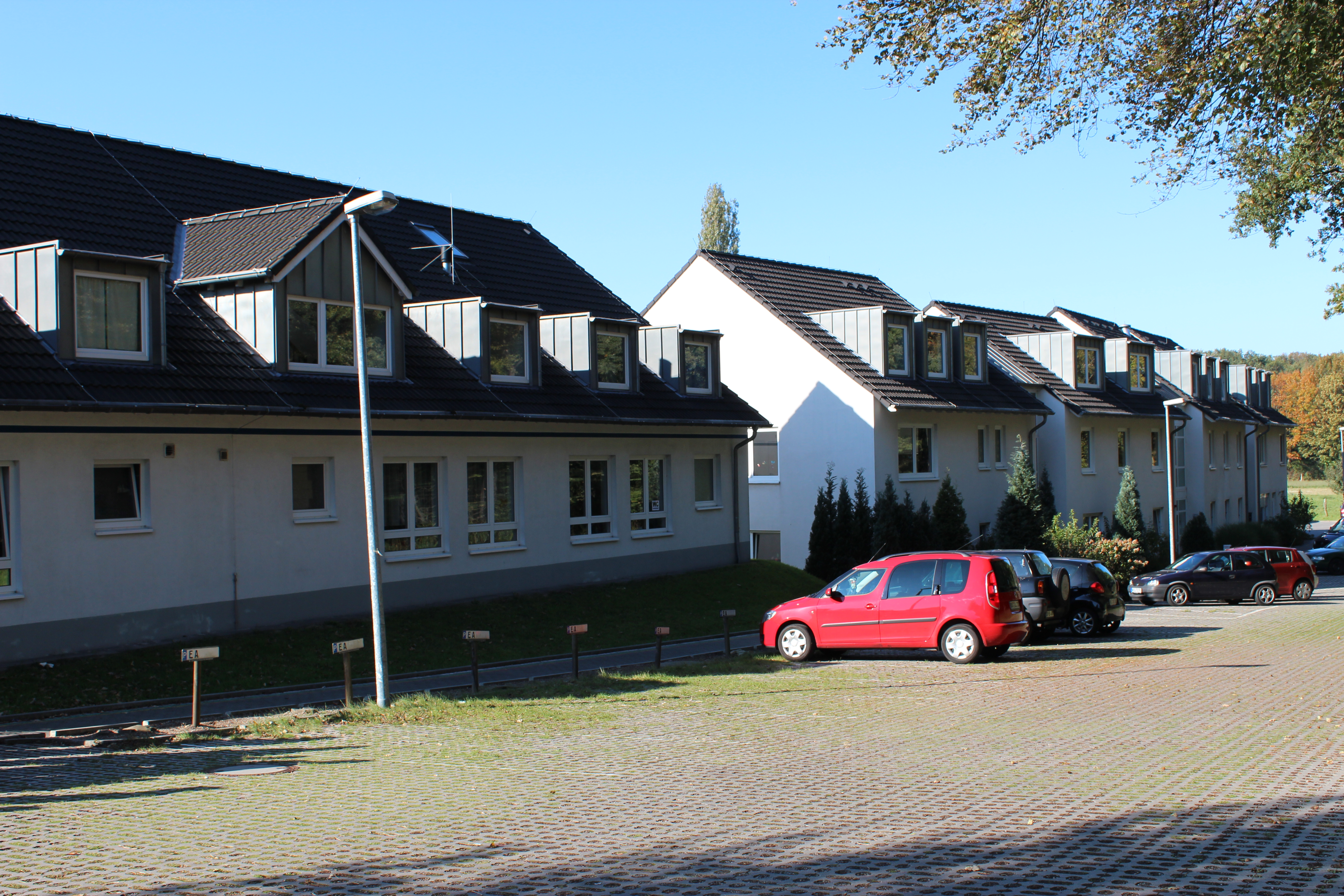 Friedensdorf International Oberhausen - Gebäude des Bildungswerks